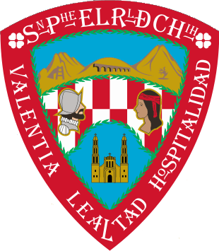 Escudo de Chihuahua como esta By Diego castro based on a one by Juan Manuel Gabino in wikipedia commons autre version